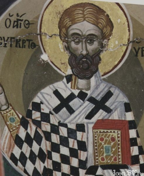 Апостол Асинкрит, от 70-ти